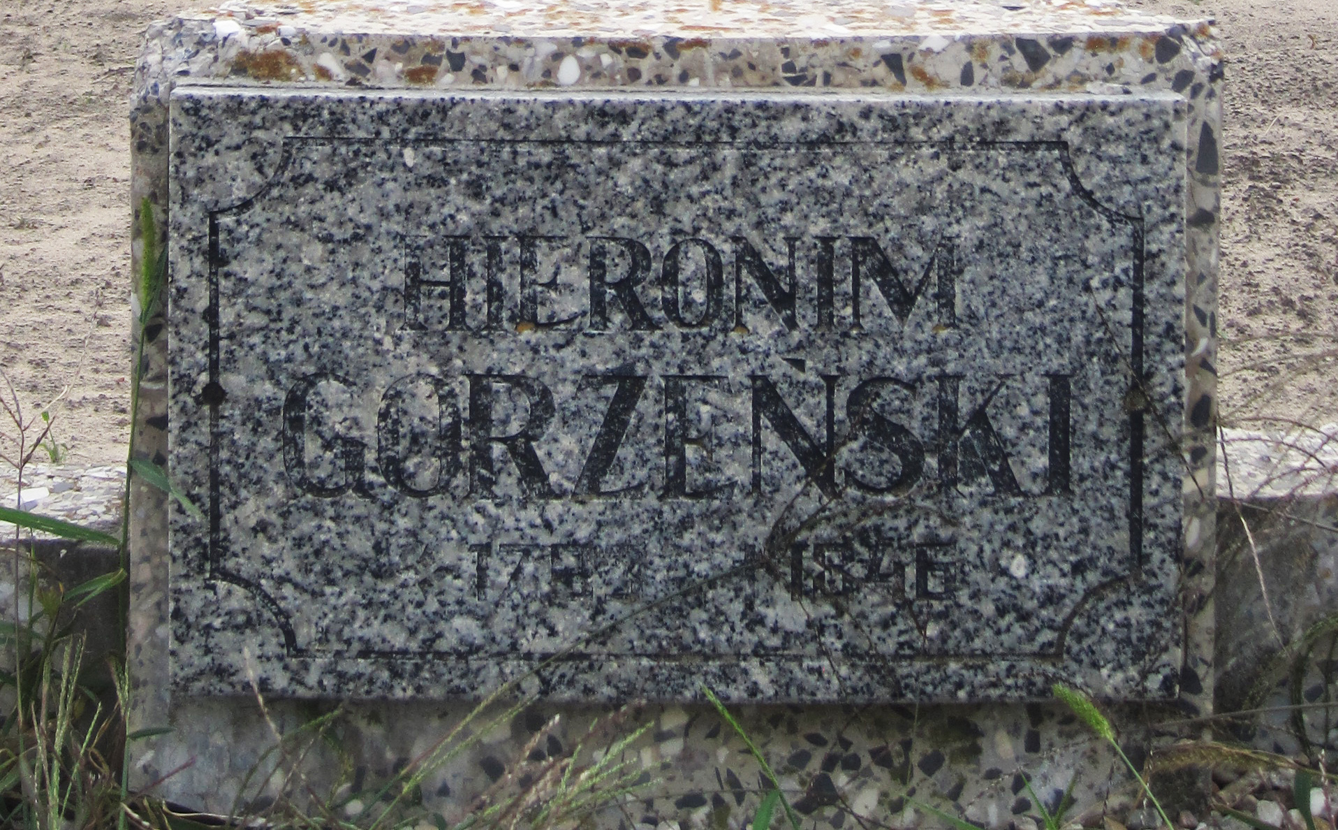 Kamień nagrobny Hieronima Gorzeńskiego na cmentarzu we Lgowie k. Jarocina.